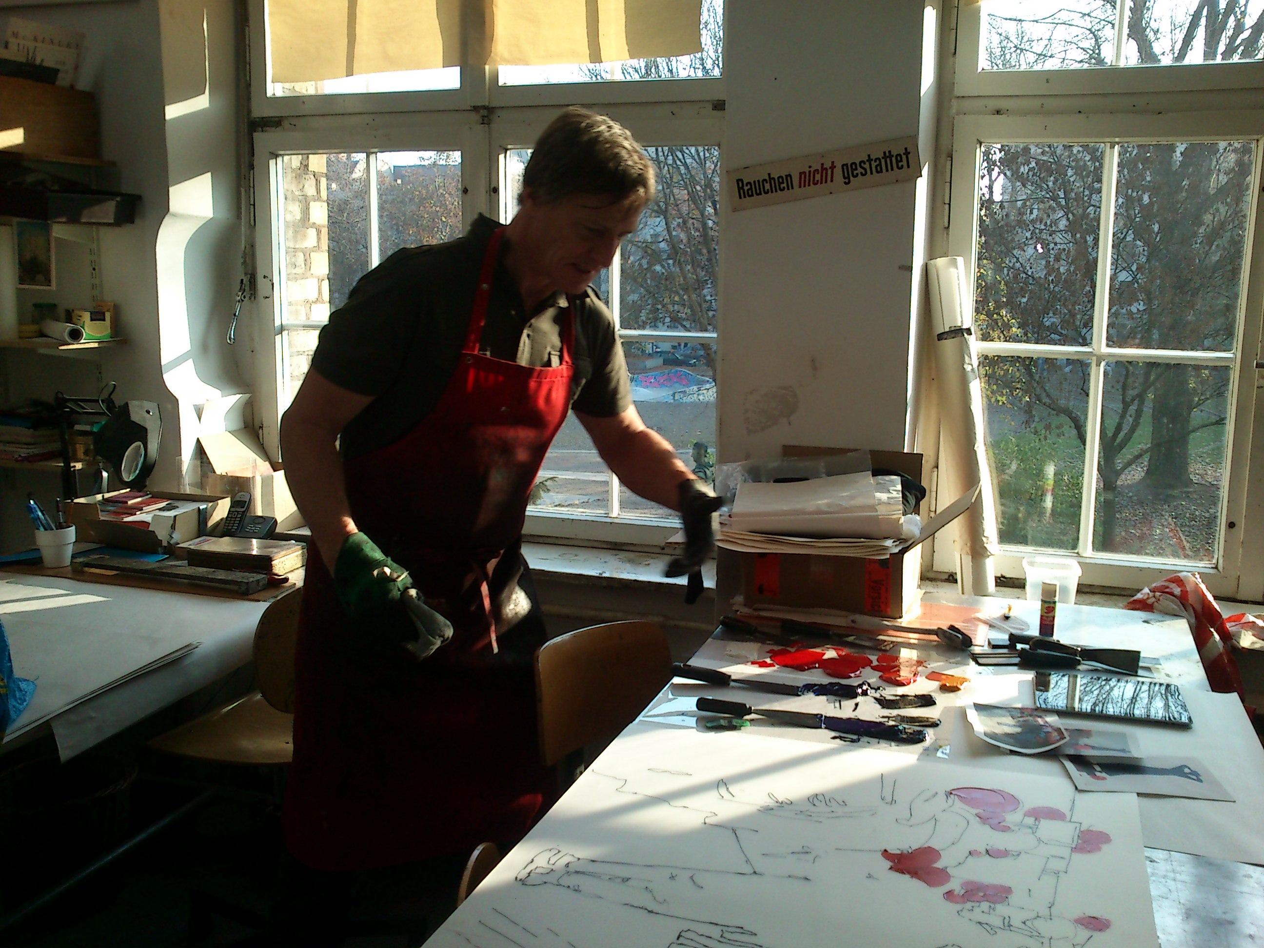 David Antonides fertigt eine Montotypie in der Radierwerkstatt im Kunstquartier Bethanien an.